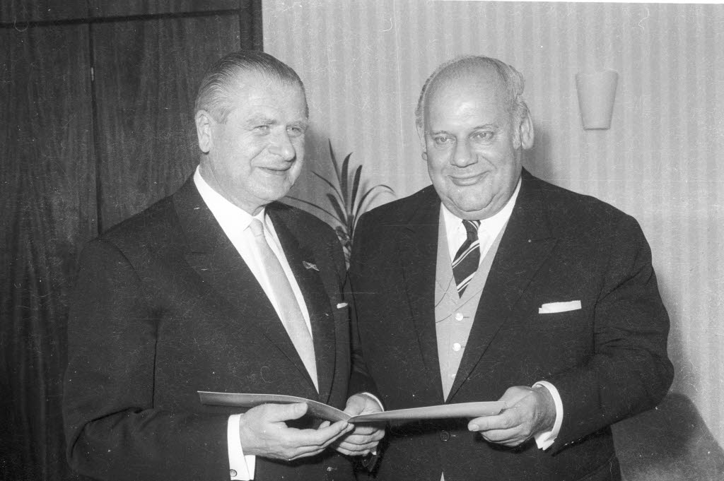 Gerhard Gaul (rechts) übernimmt nach der Landtagswahl im neuen Kabinett Lemke das Justizministerium von Bernhard Leverenz (links).